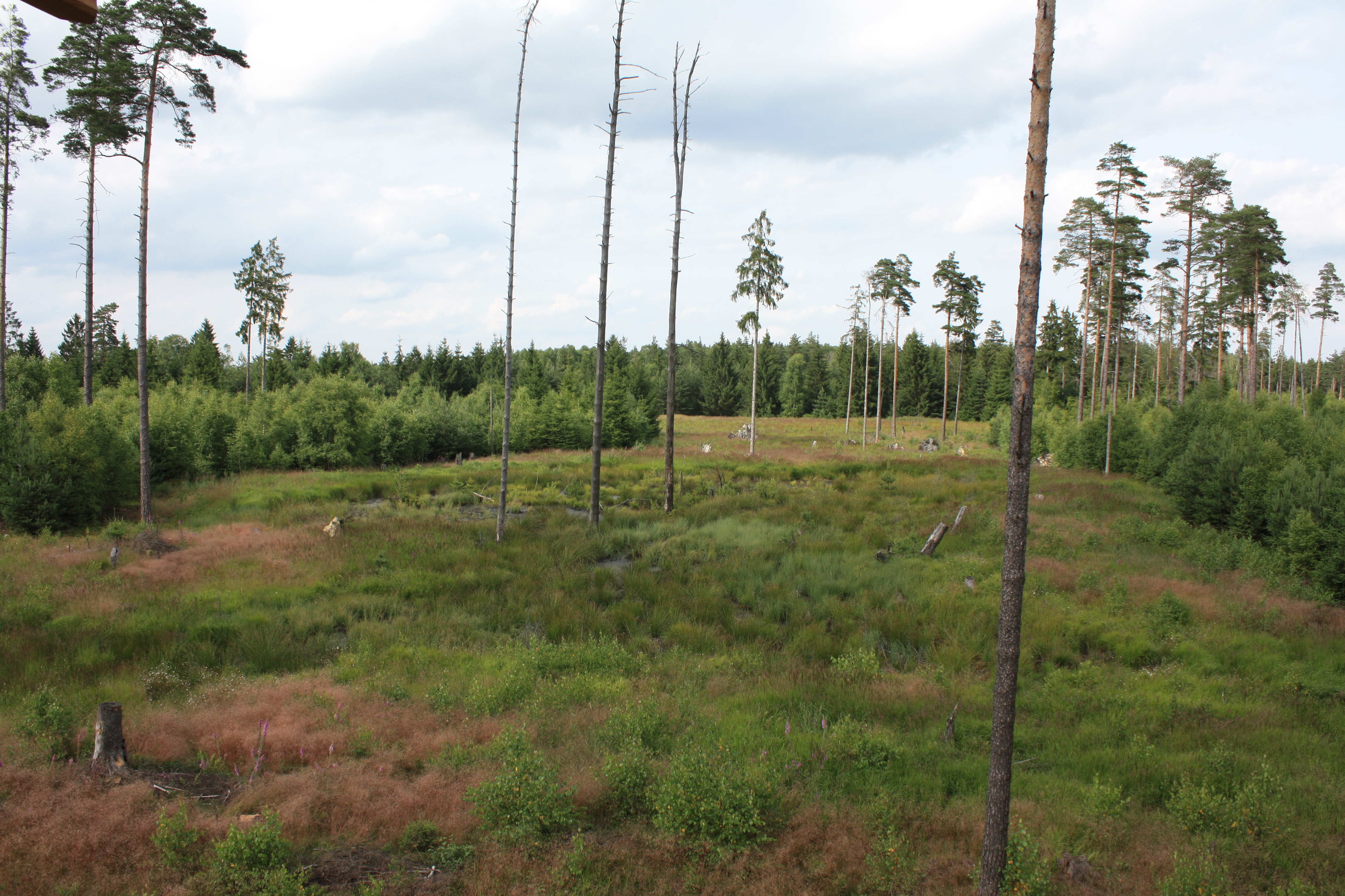 Moorerlebnispfades im Pöllwitzer Wald